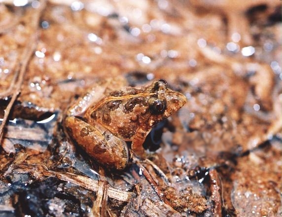 Pseudopaludicola saltica